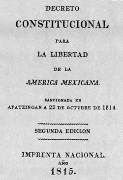 Constitución promulgada en el año de 1814 en Apatzingán, Michoacán.